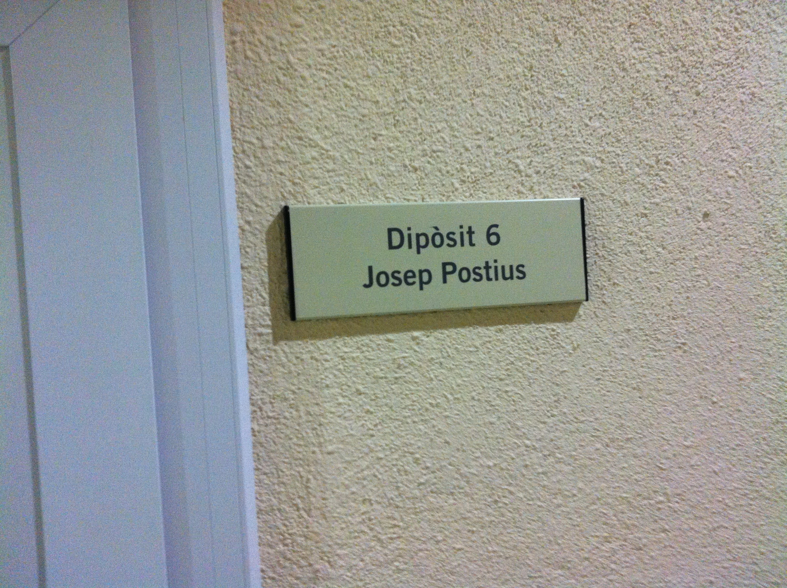 Magatzems de l'Arxiu Fotogràfic de Barcelona